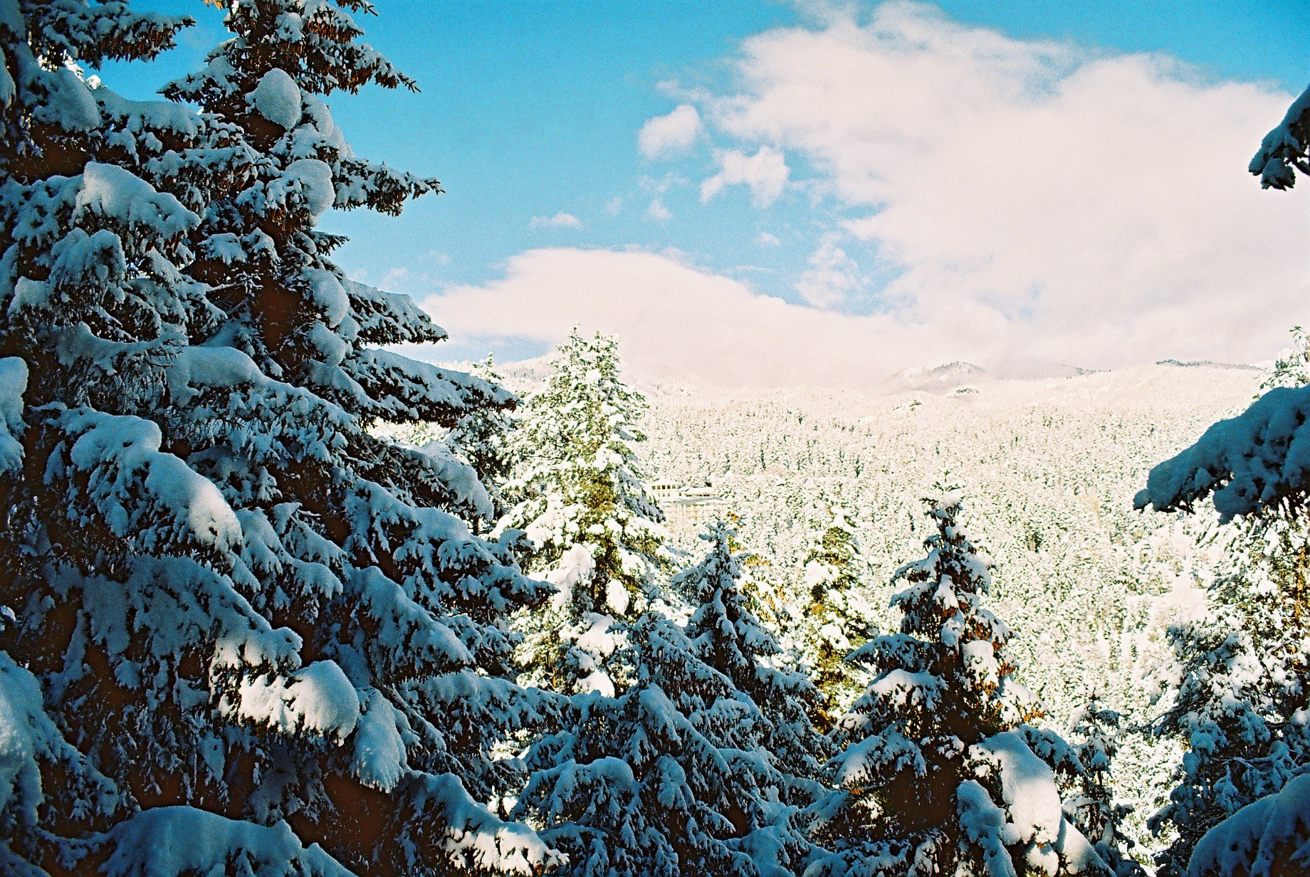 Abastumani